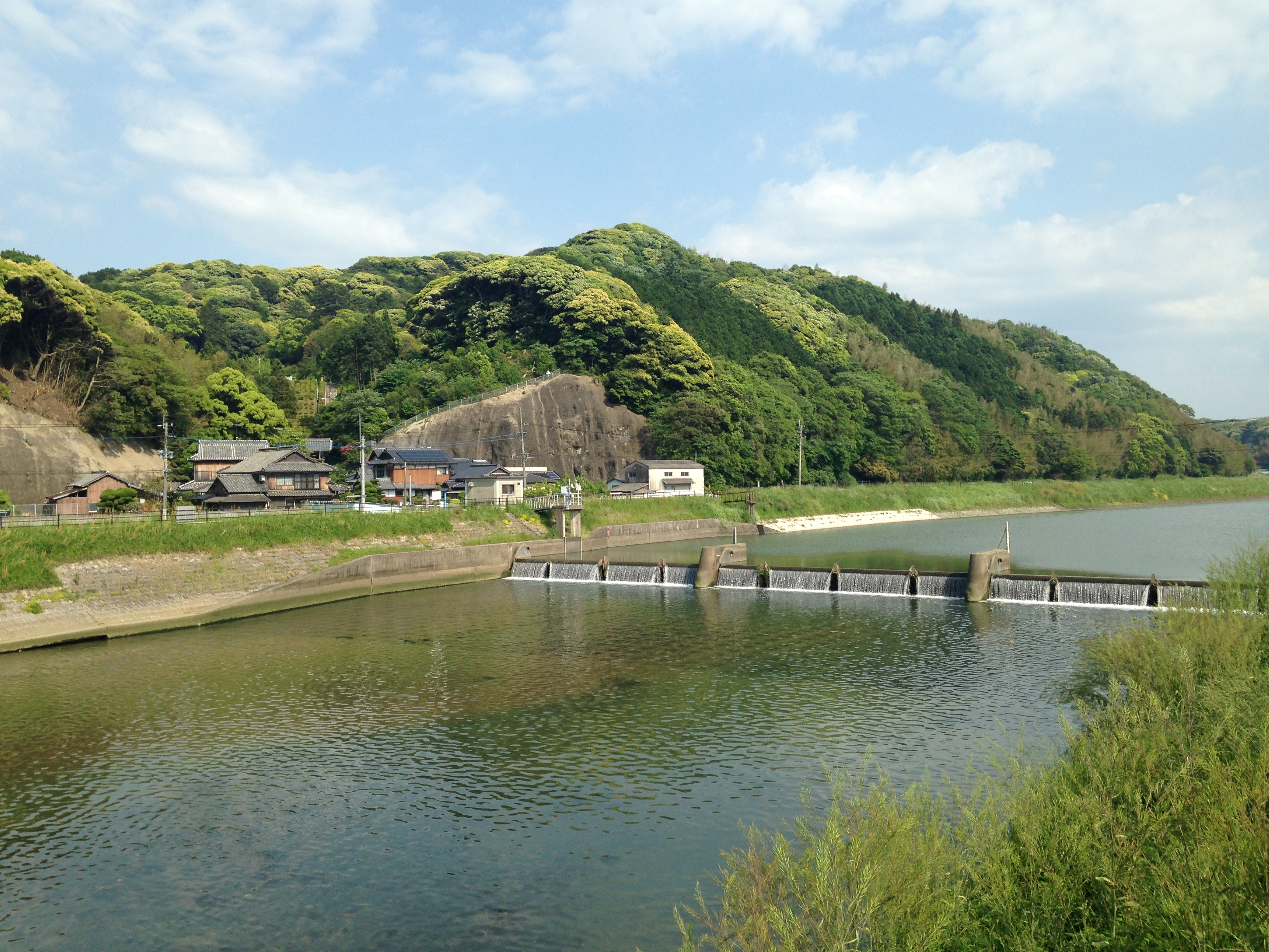 川端橋西詰より望む釣川(上流側)と川端井堰